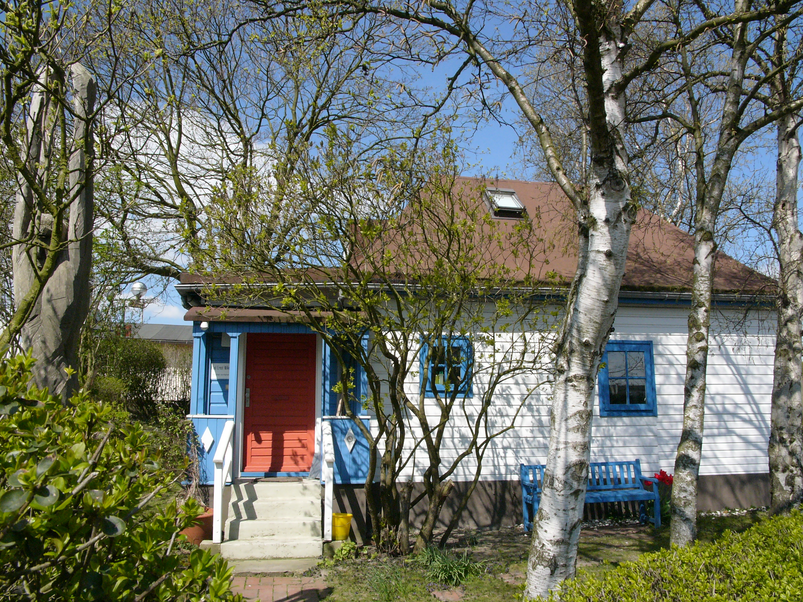 Paul-Ernst-Wilke Haus in Bremerhaven